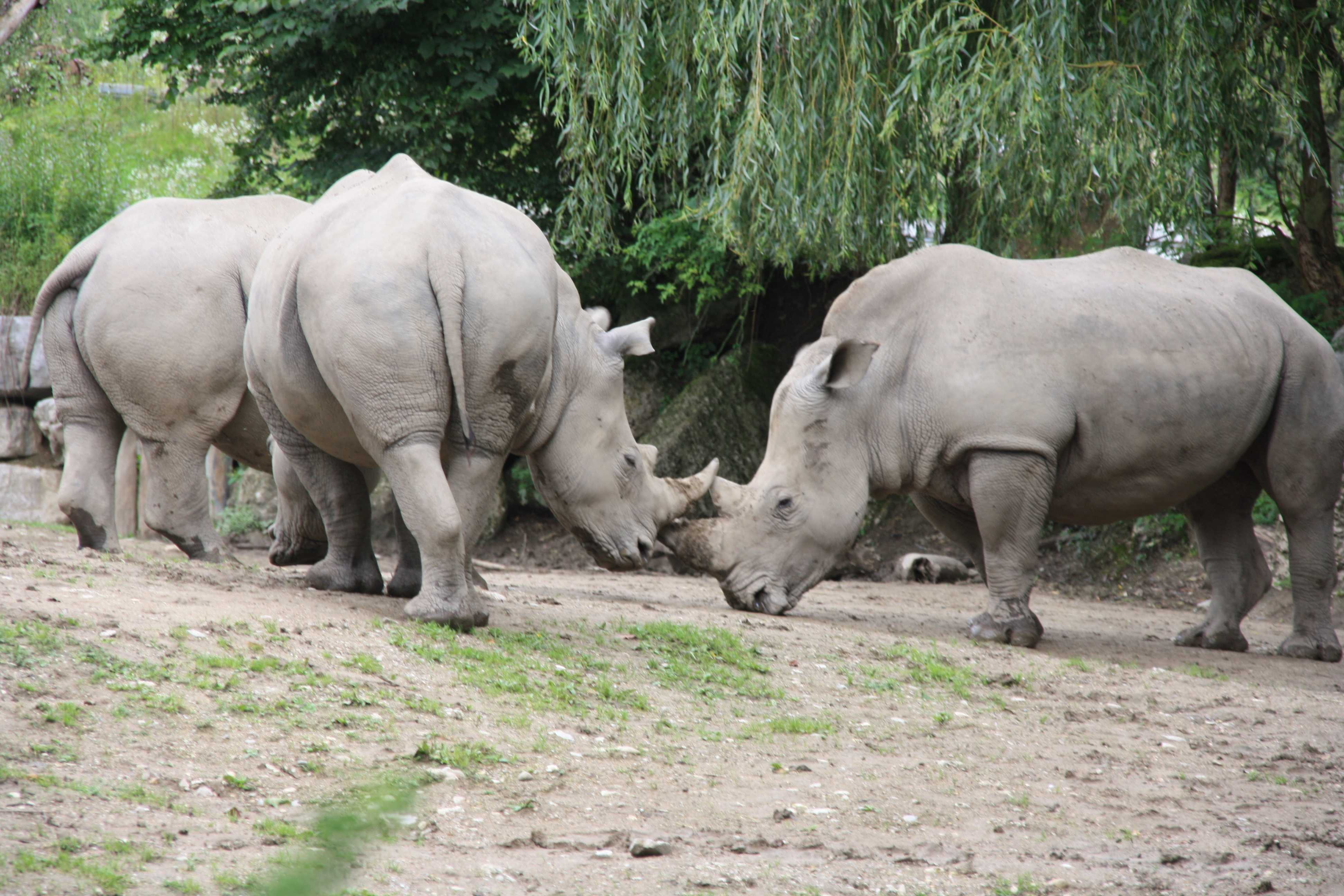 Nashörner im Zoo Salzburg